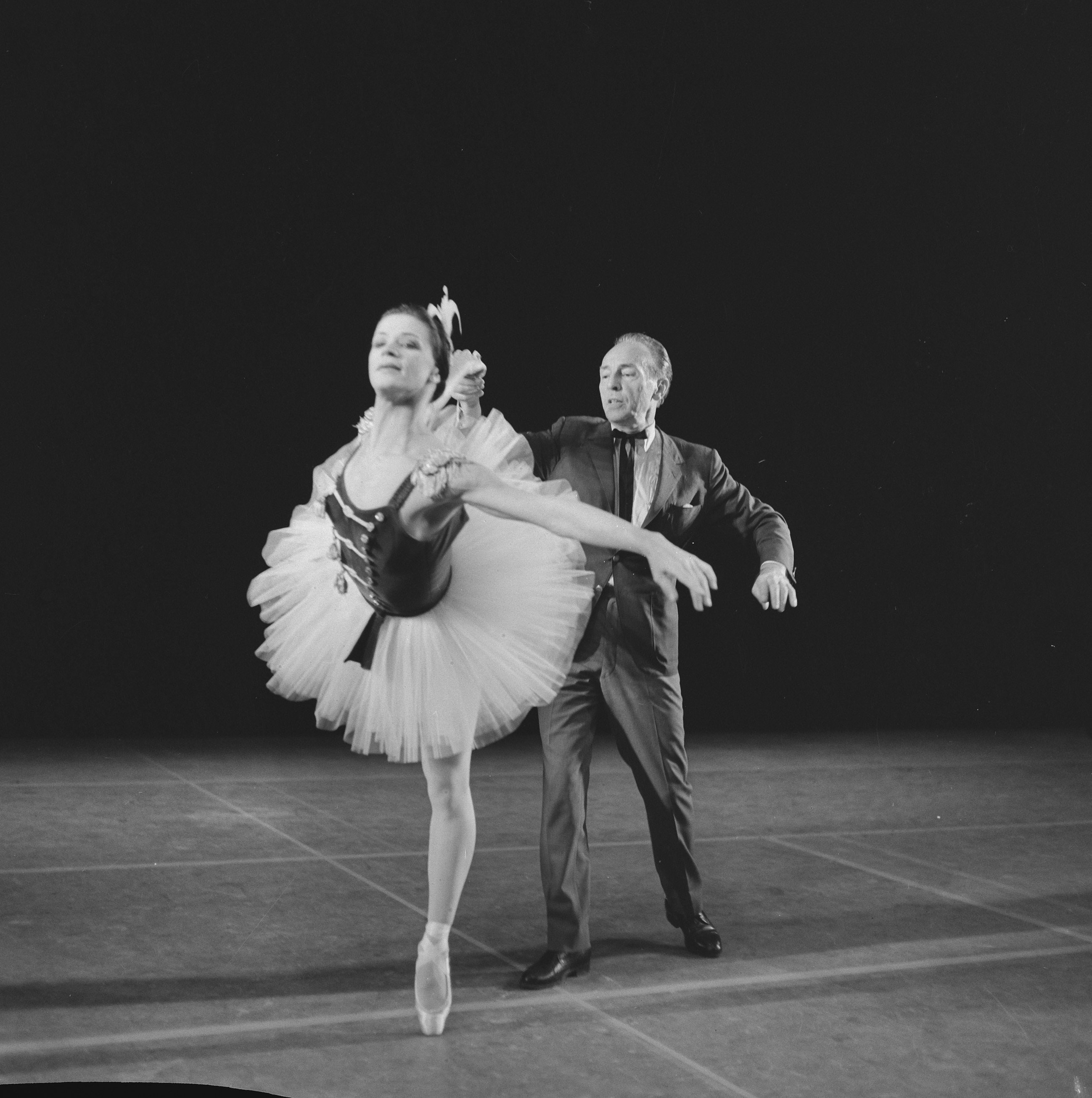 Collectie / Archief : Fotocollectie Anefo Reportage / Serie : [ onbekend ] Beschrijving : New York City Ballet in Amsterdam, repetitie New York City Ballet. Choreograaf George Balanchine geeft aanwijzingen Datum : 26 augustus 1965 Locatie : Amsterdam, Noord-Holland Trefwoorden : ballet, repetities Persoonsnaam : Balanchine George Instellingsnaam : New York City Ballet Fotograaf : Kroon, Ron / Anefo Auteursrechthebbende : Nationaal Archief Materiaalsoort : Negatief (zwart/wit) Nummer archiefinventaris : bekijk toegang 2.24.01.03 Bestanddeelnummer : 918-1121